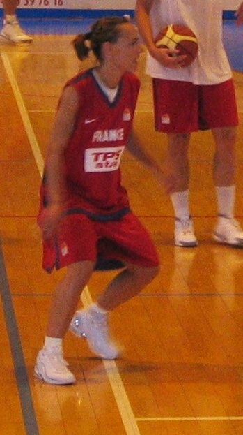 Photo de la joueuse française de basket-ball Céline Dumerc. Photo prise par sanguinez pendant le stage de préparation au Championnat du Monde Brésil'06 qui se déroulait à Clermont-Ferrand. Picture of the french basketball player Céline Dumerc, take in Clermont-Ferrand during the frnch preparation for the 2006 World Championship